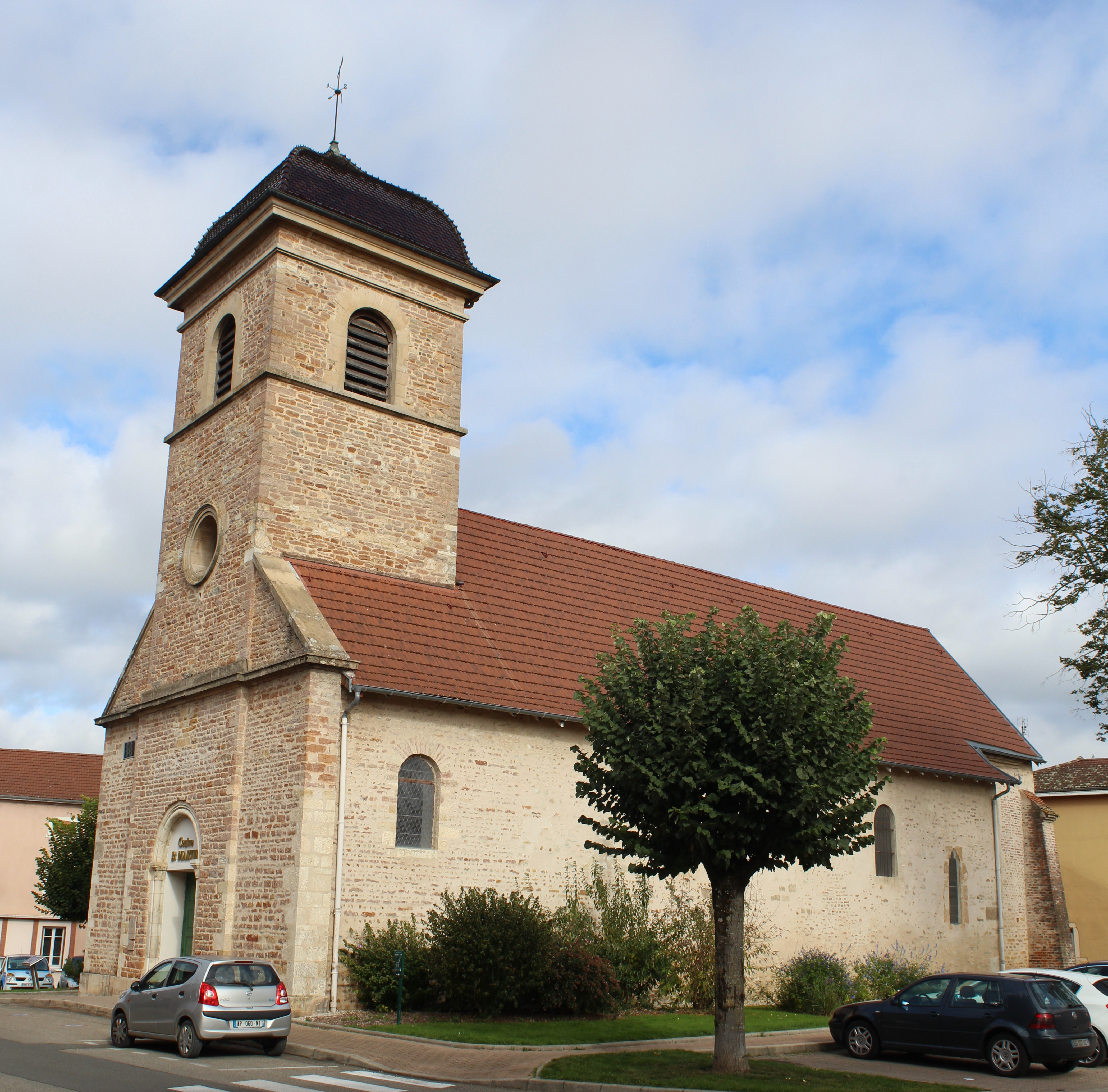 Centre Saint-Martin de Vonnas.